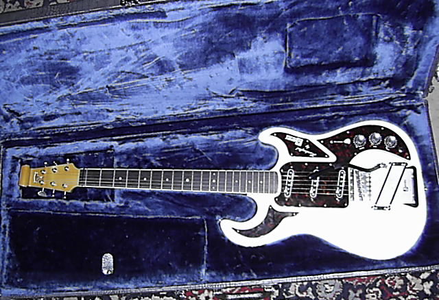 Burns "The Marvin Anniversary 1964-2004". The Guitar has the serial-number 770 of 2004.